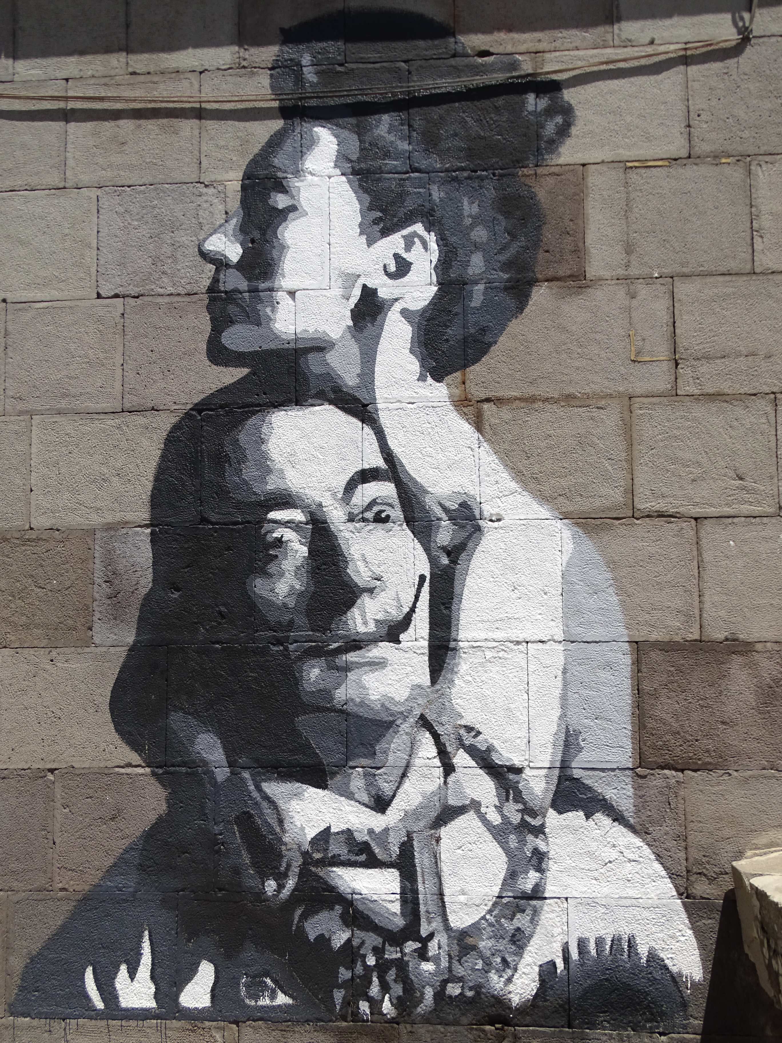 Dali Mural - Gyumri - Armenia